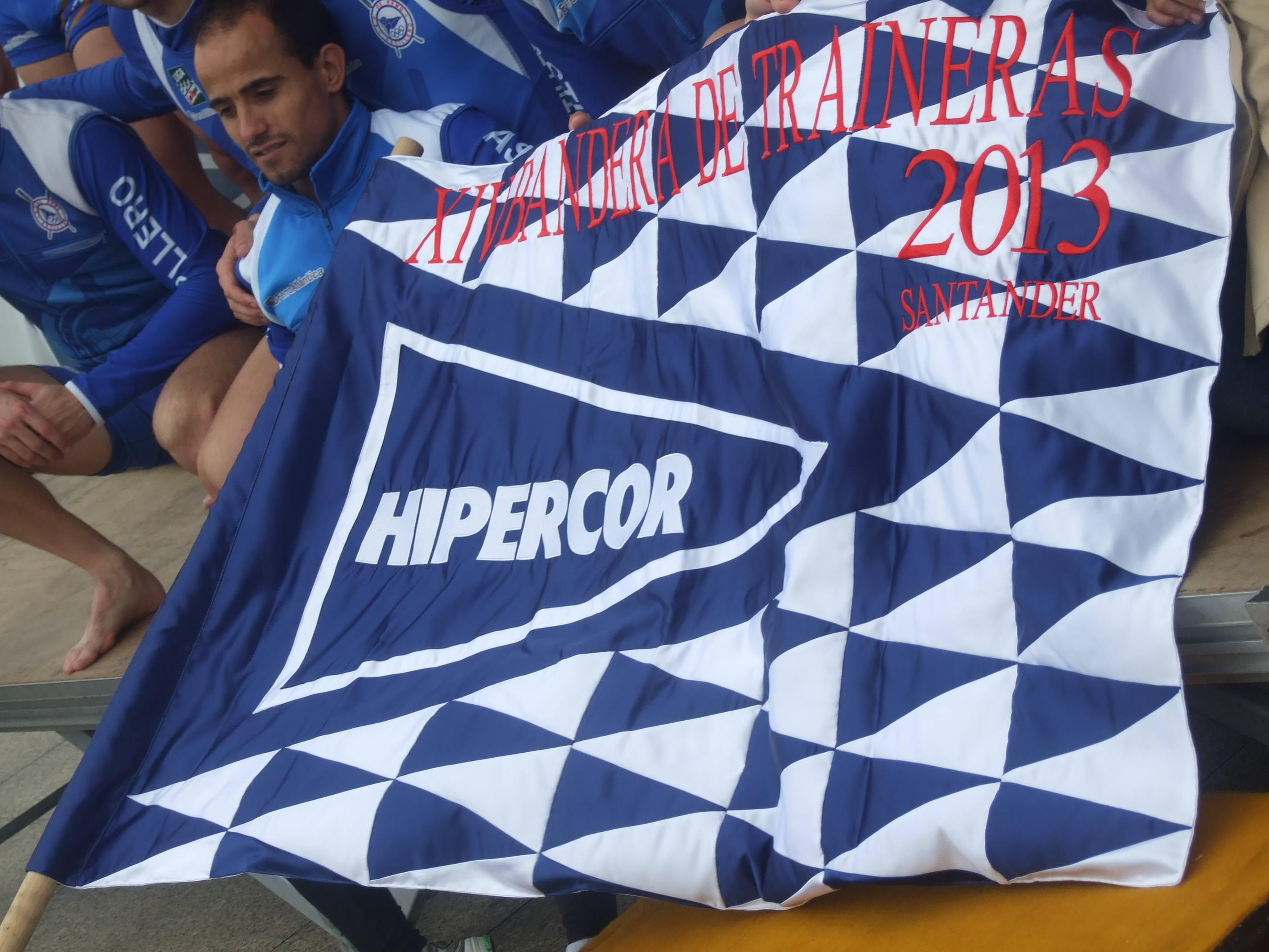 Premio que reciben los ganadores de la regata. La Bandera Hipercor 2013.